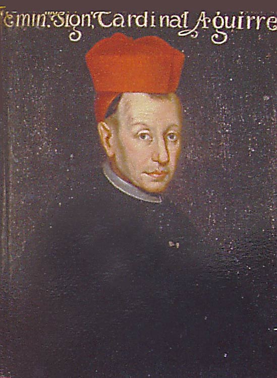 Cardenal José Sáenz de Aguirre, ilustre monje benedictino del monasterio de San Millán de Yuso (La Rioja, España).